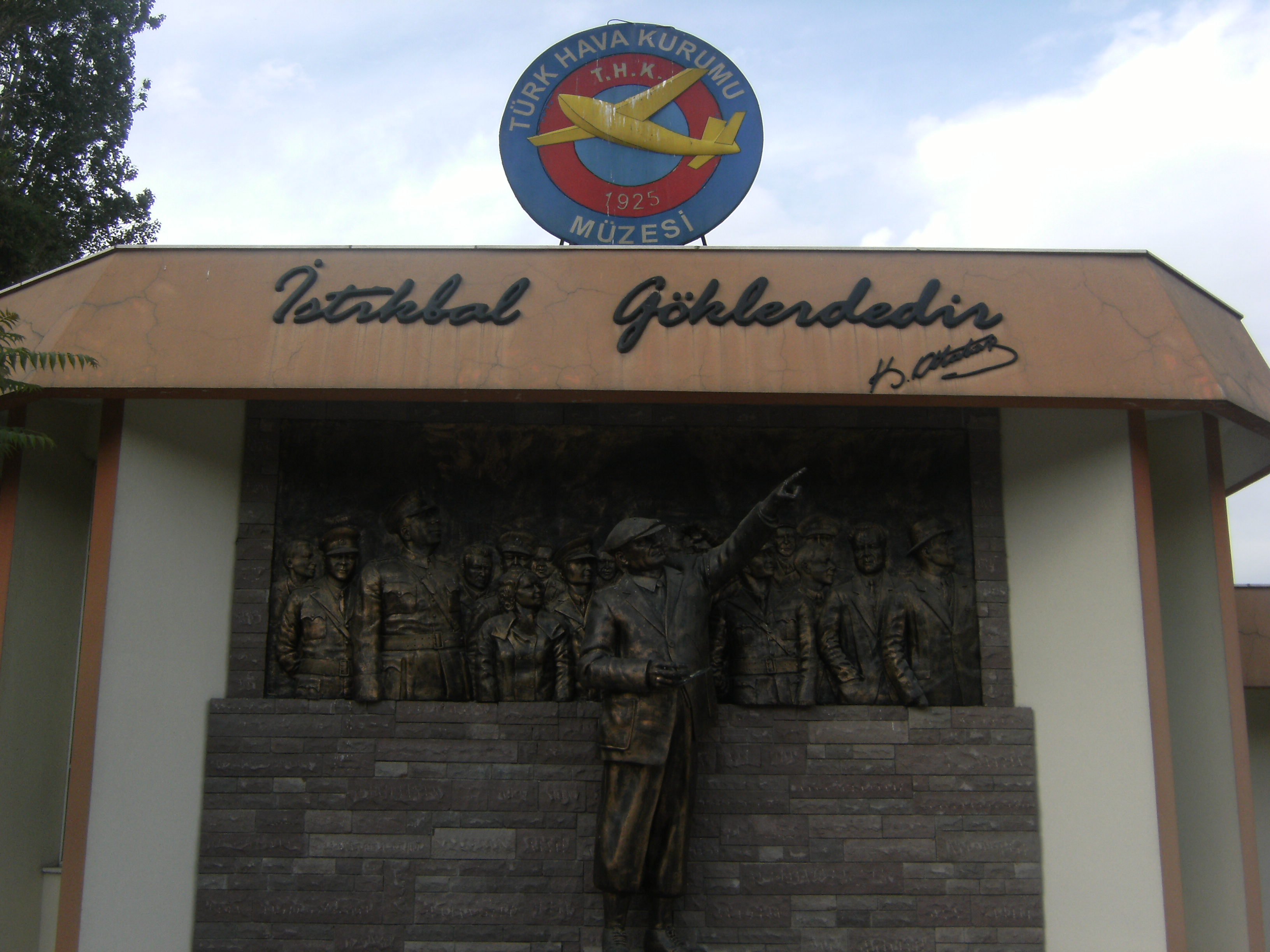 Ankara Türk Hava Kurumu Müzesi girişi